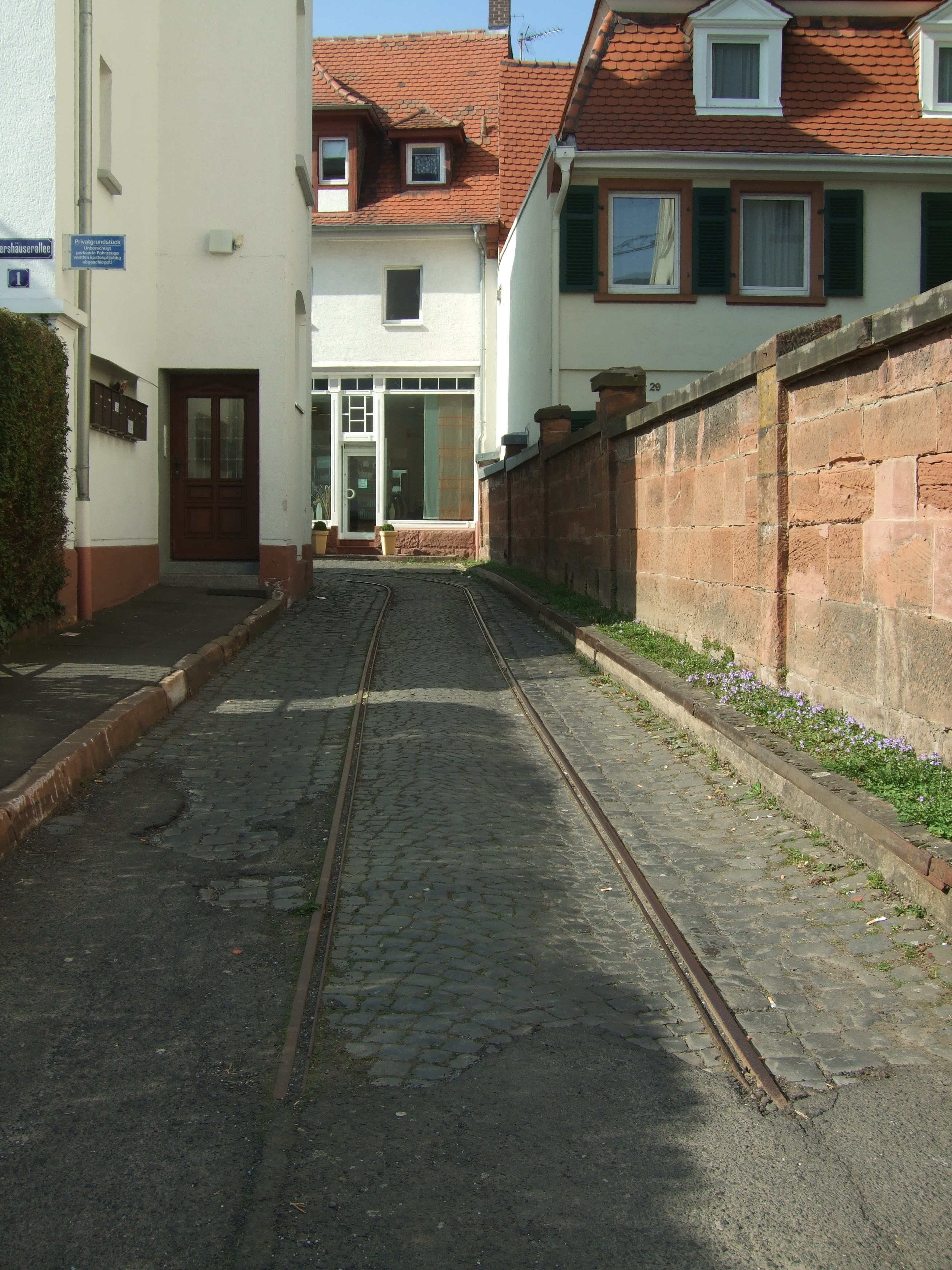 Ehemalige Straßenbahnschiene in Marburg (Ockershausen)